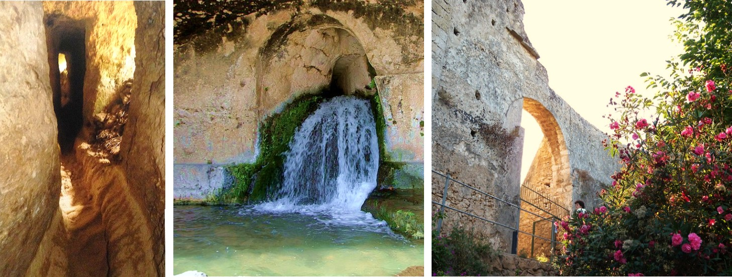 Acquedotto Galermi di Siracusa. Immagini già presenti su Commons.